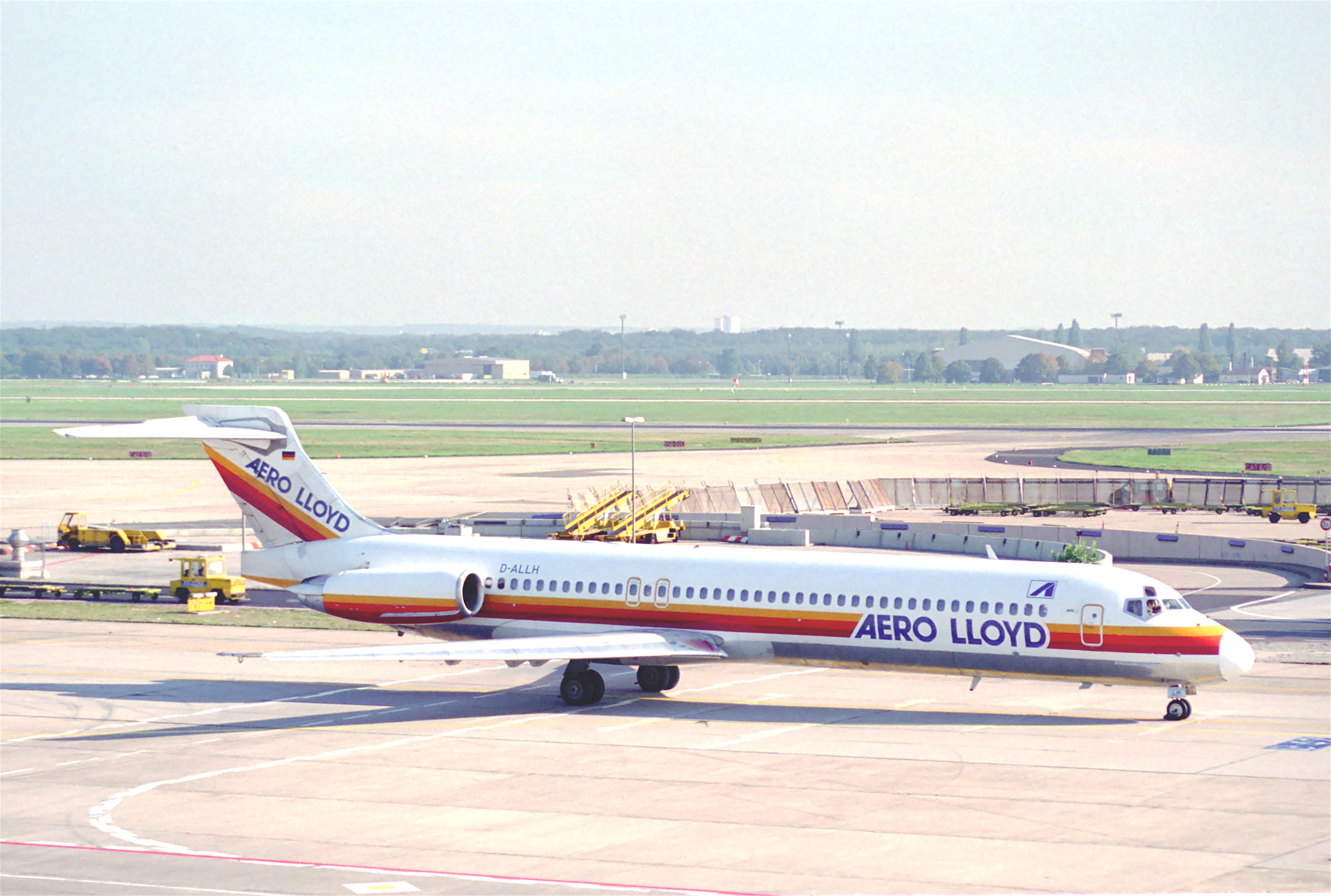 Aero Lloyd MD-87; D-ALLH@FRA;10.10.1995